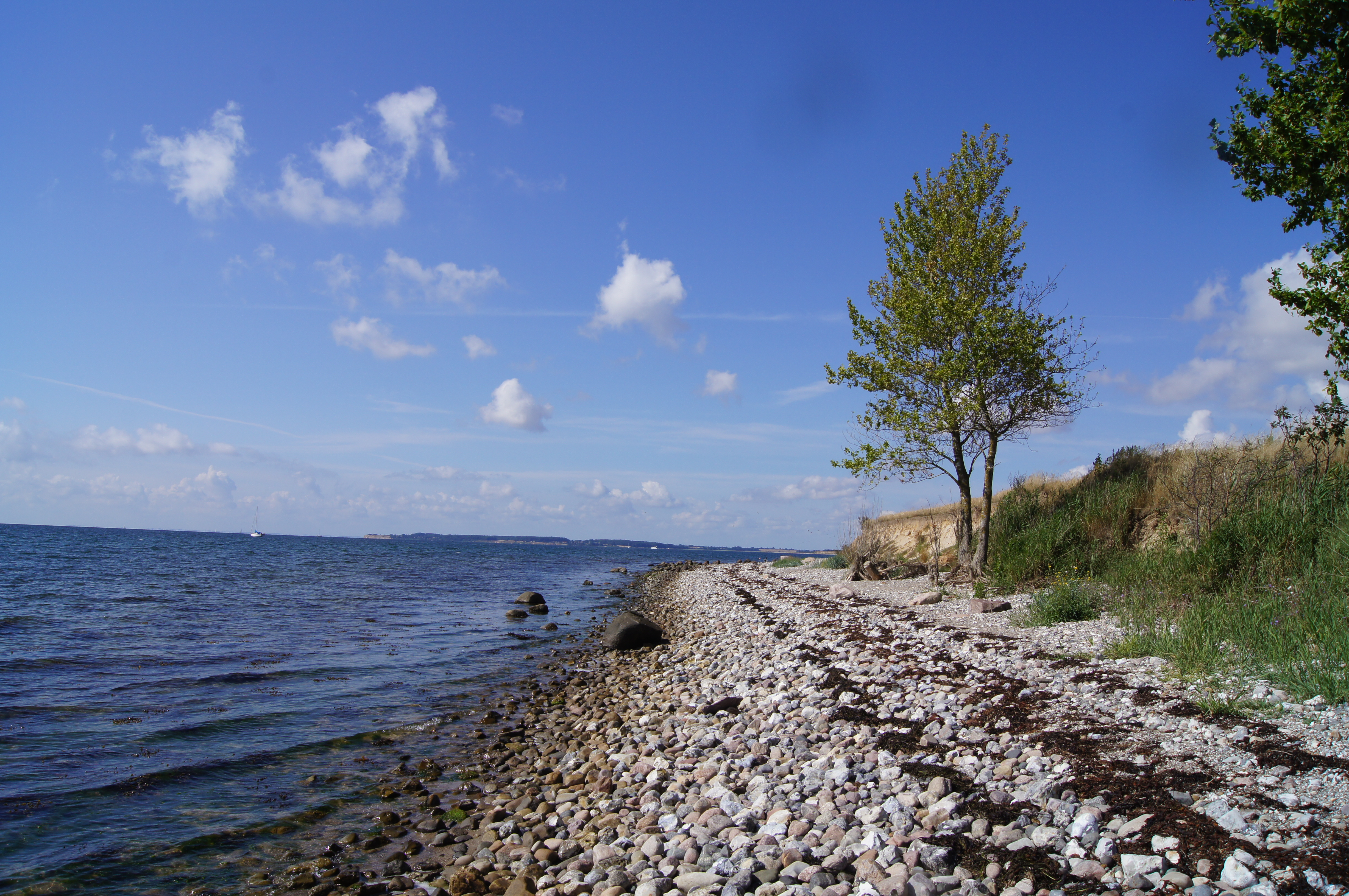 Årø Südstrand